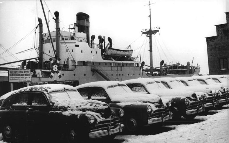 Rostock, Überseehafen, Sowjetische PKW "Pobeda", Winter Zentralbild Mellahn Stö-He. 9.1.1959 Rostock: Frachter "Wismar" brachte sowjetische PKW Mit einer Ladung sowjetischer PKW vom begehrten Typ "Pobeda" ist der 3000 Tonnen Frachter "Wismar" im Rostocker Hafen eingetroffen. UBz: In ein weisses Winterkleid gehüllt warten das "Pobeda" auf ihren Weitertransport.